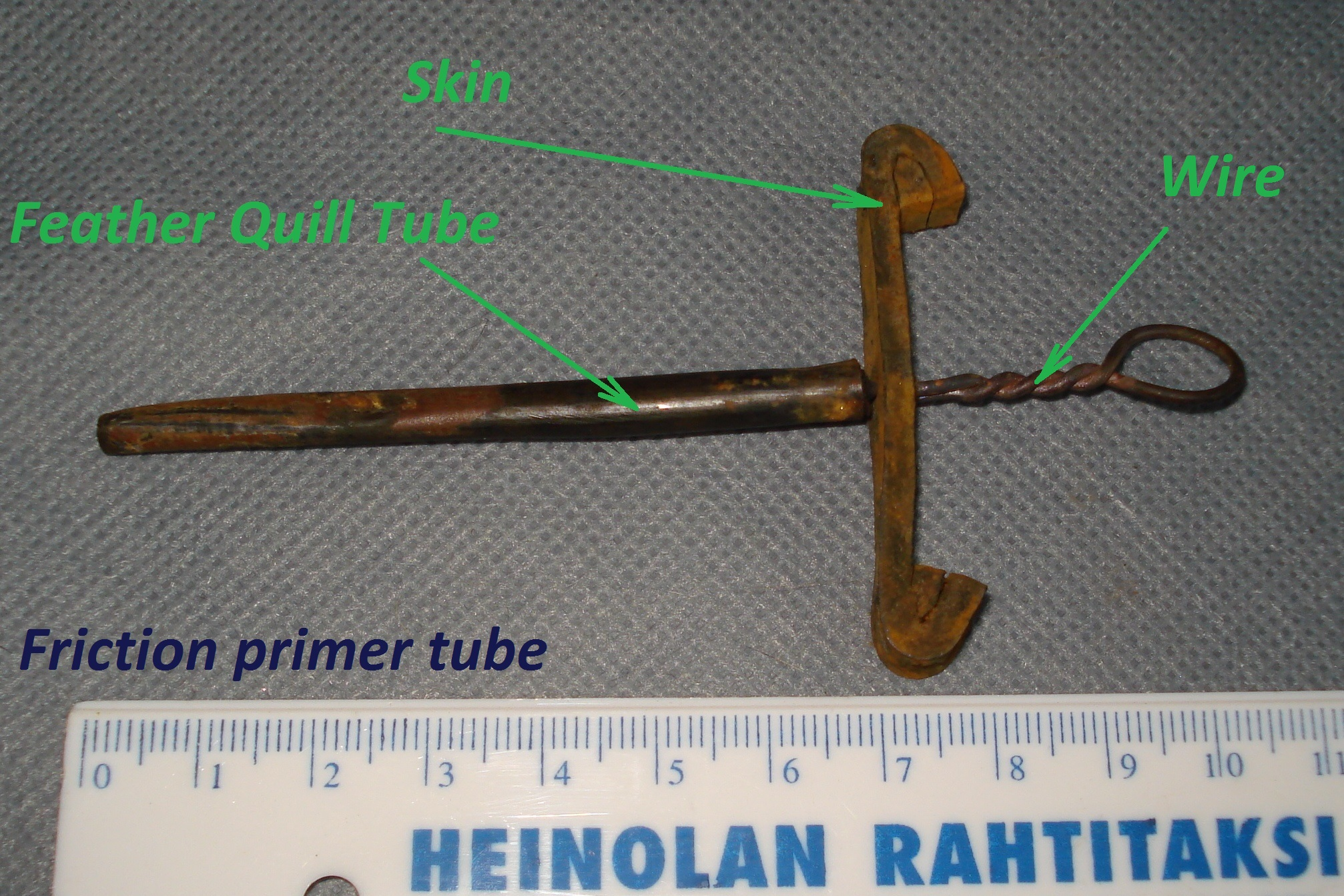 Ранняя артиллерийская запальная трубка.